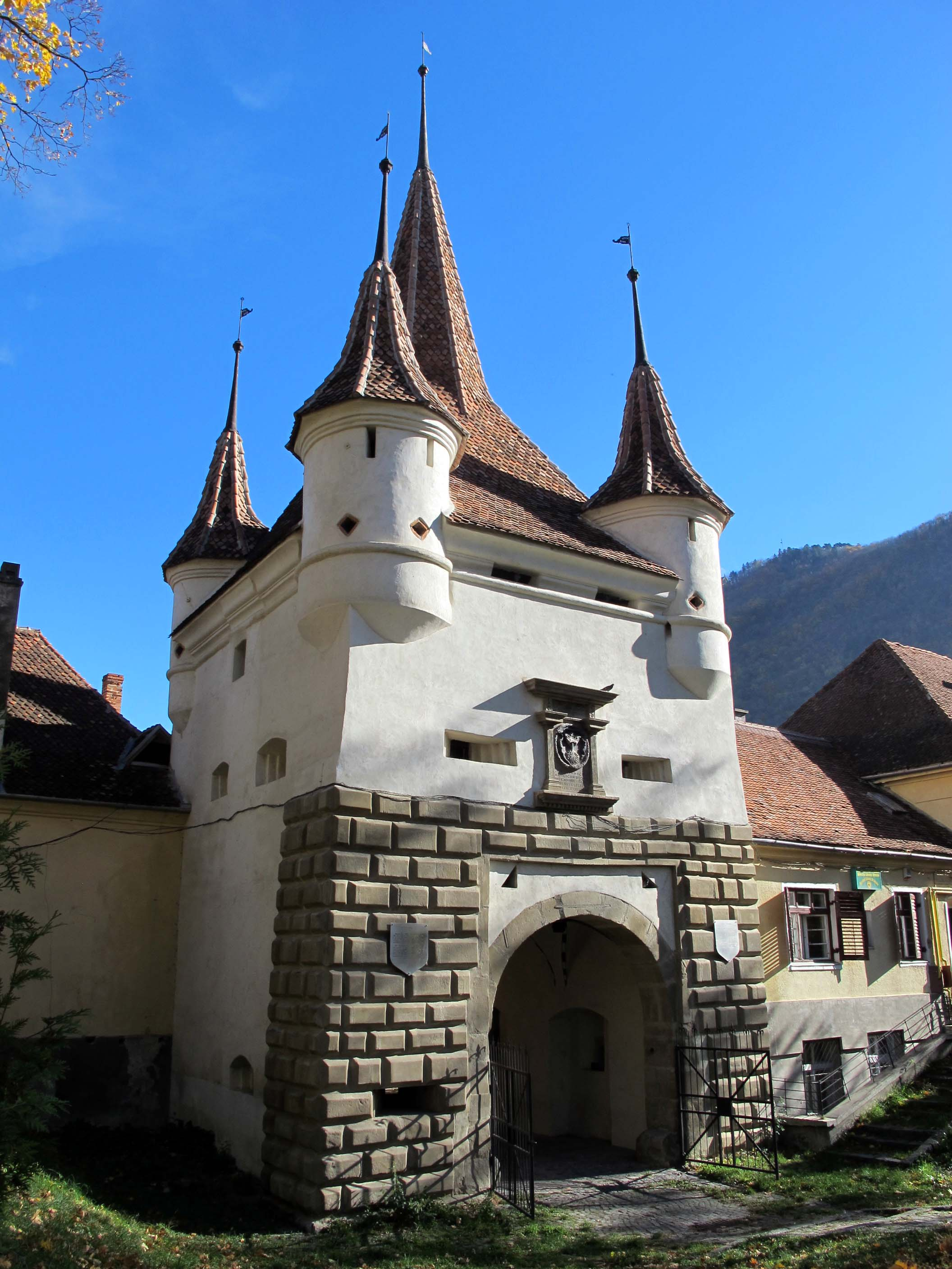 Brasov, porta ecaterineu